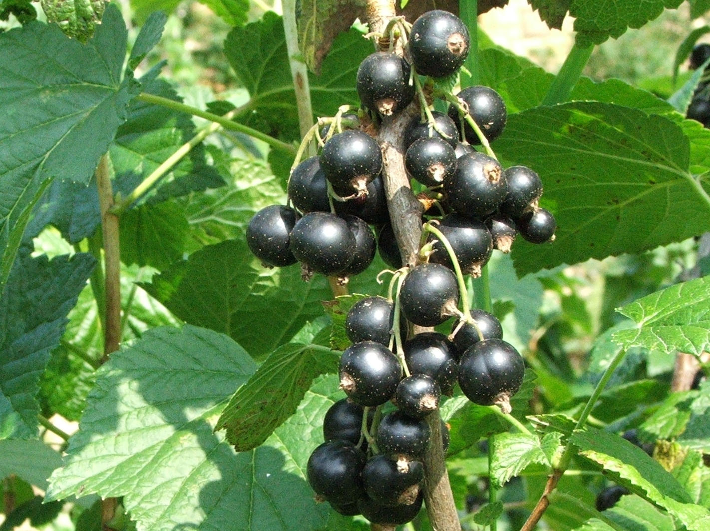 Ribes nigrum (pl. porzeczka czarna)